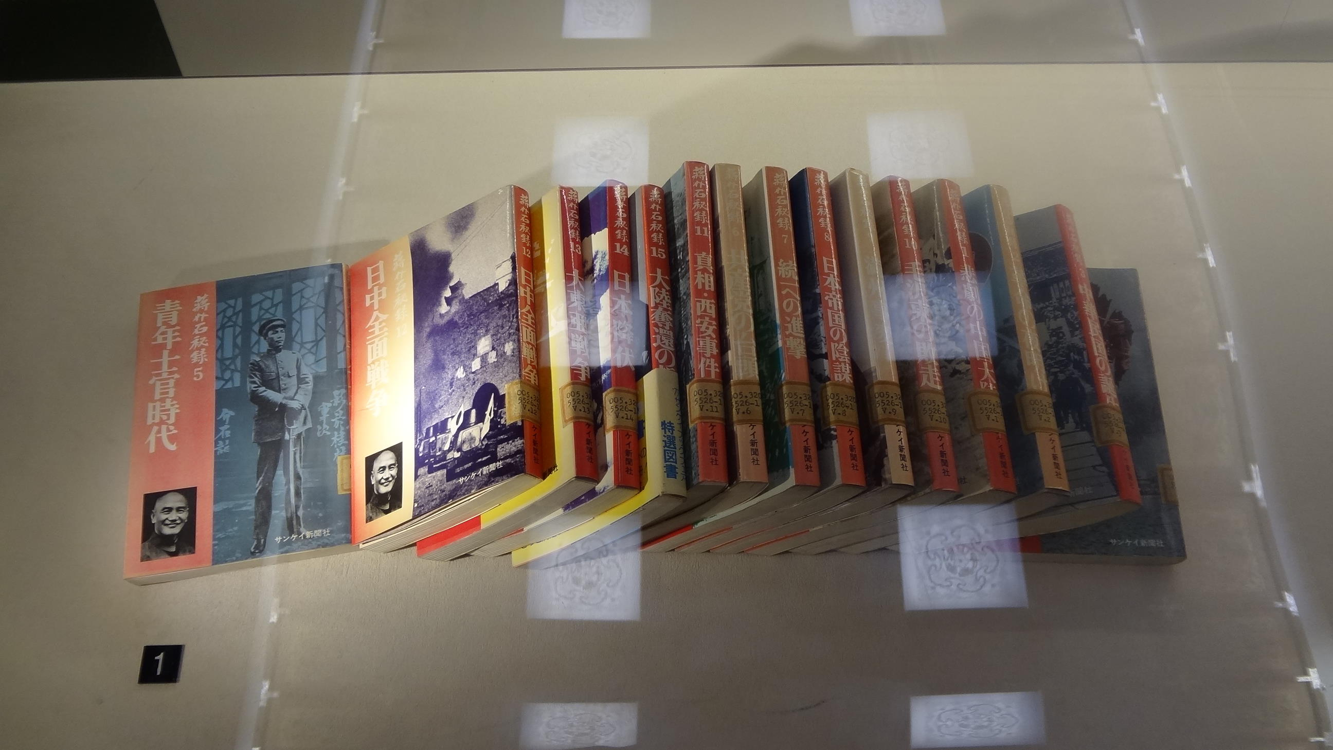 國立中正紀念堂展示的《蔣總統秘錄》日文版全部單行本。